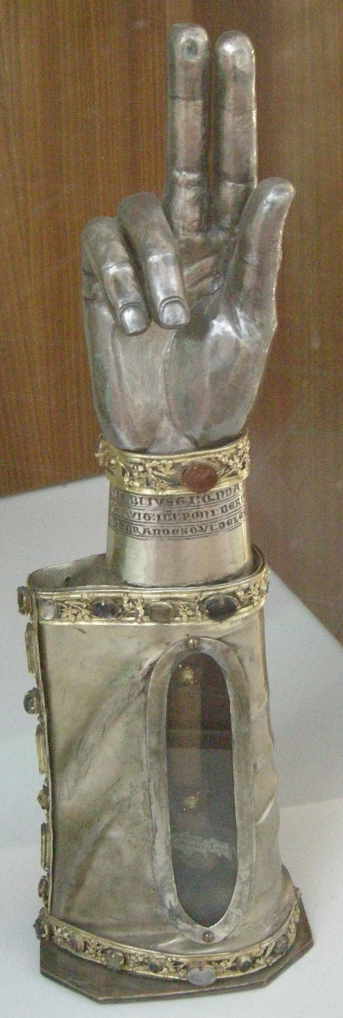 Arte francese, reliquiario del braccio di san giusto, fine xiii sec, argento e gemme [1]